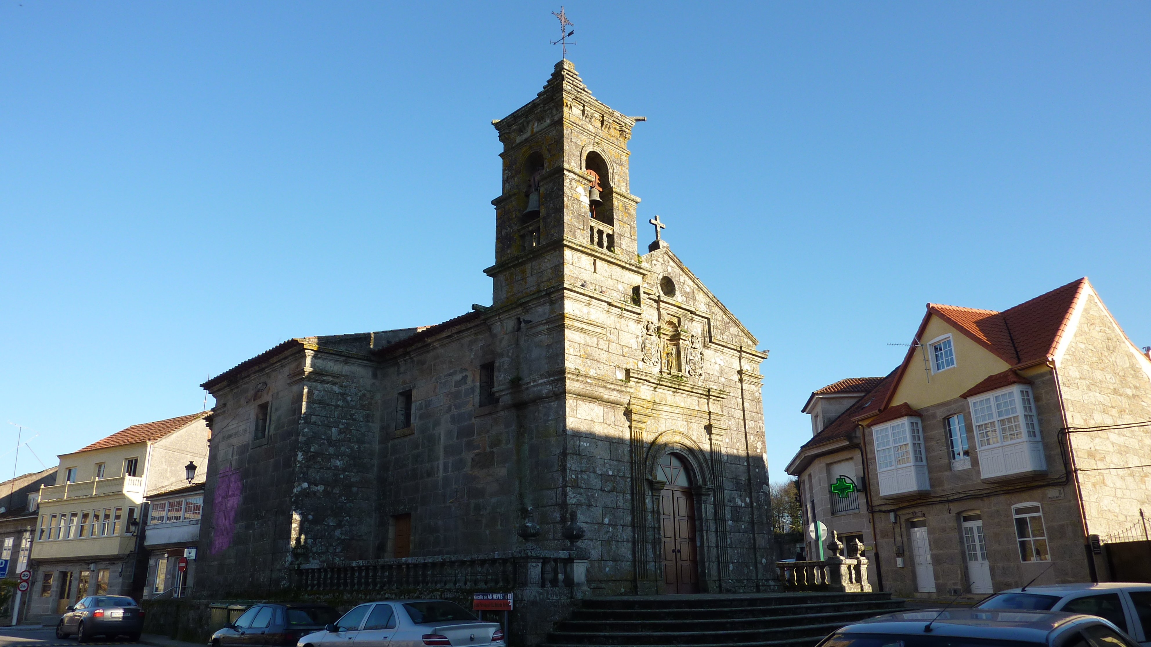 Iglesia das Neves (Pontevedra)